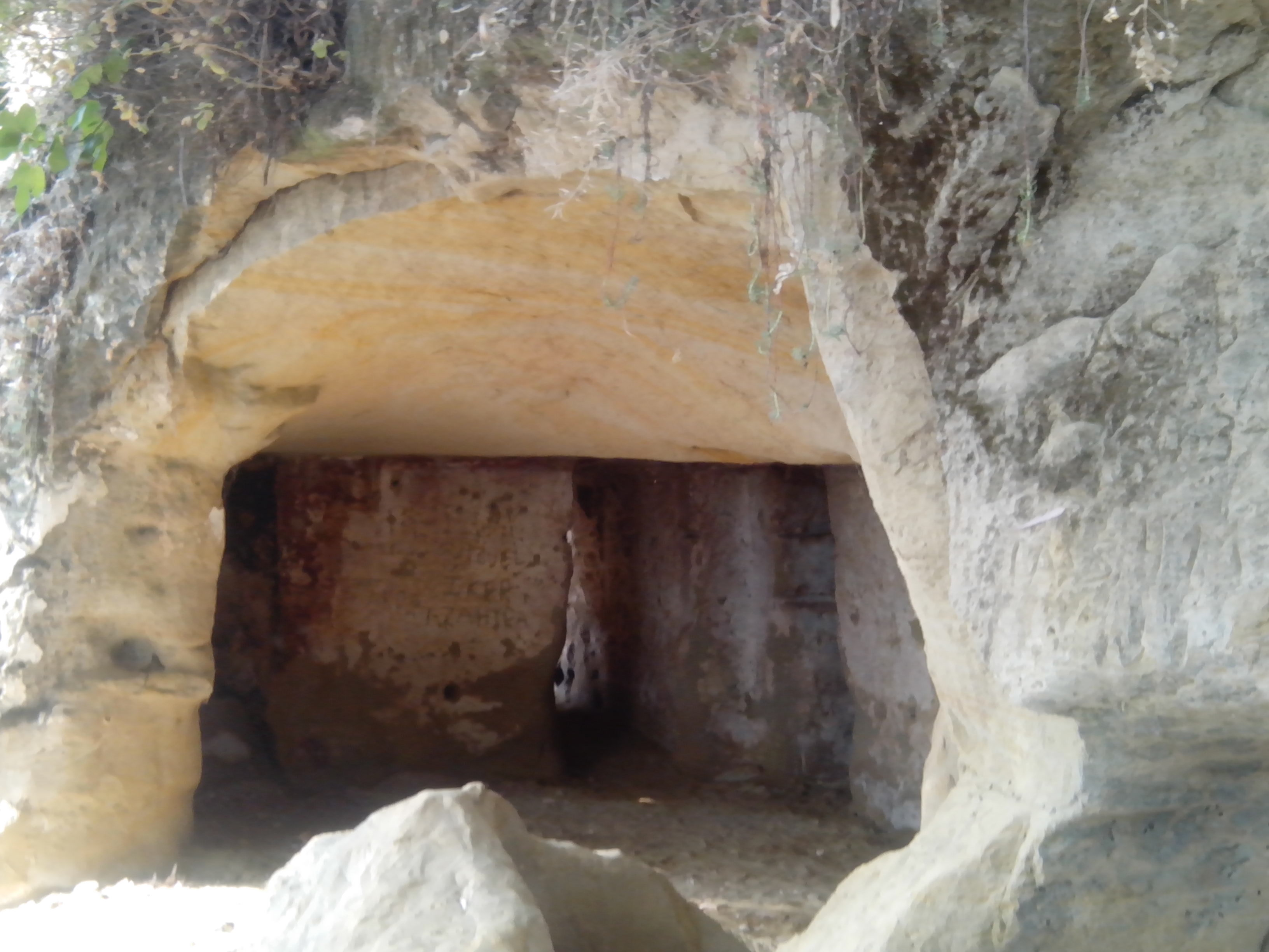 Cuevas de Lituergo en Villanueva de la Reina (Jaén) España.